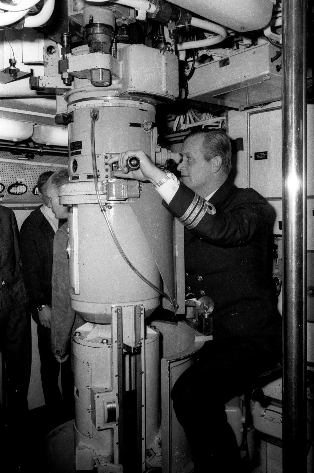 im Tirpitzhafen. Erstes britisches U-Boot mit Atomantrieb besucht Kiel. Kommandant Fregattenkapitän Peter Cobb am Periskop.